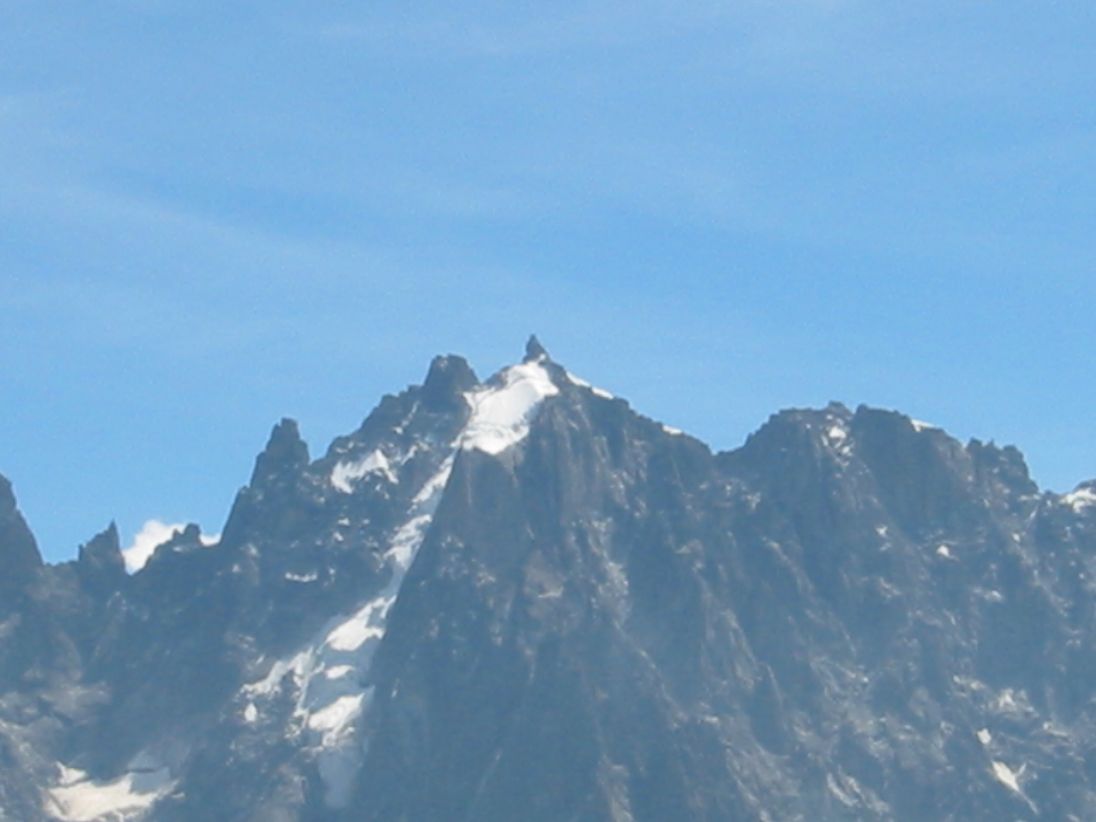 L’Aiguille du Plan depuis le Brévent, 2006.